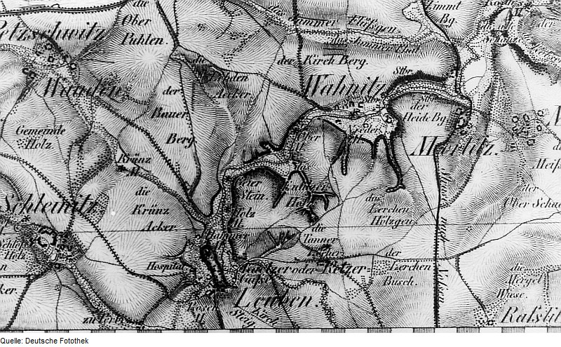 Original image description from the Deutsche Fotothek Leuben-Schleinitz-Wahnitz. Oberreit, Sect. Oschatz, 1839/40